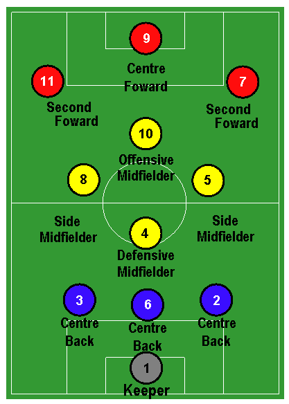 mia creazione